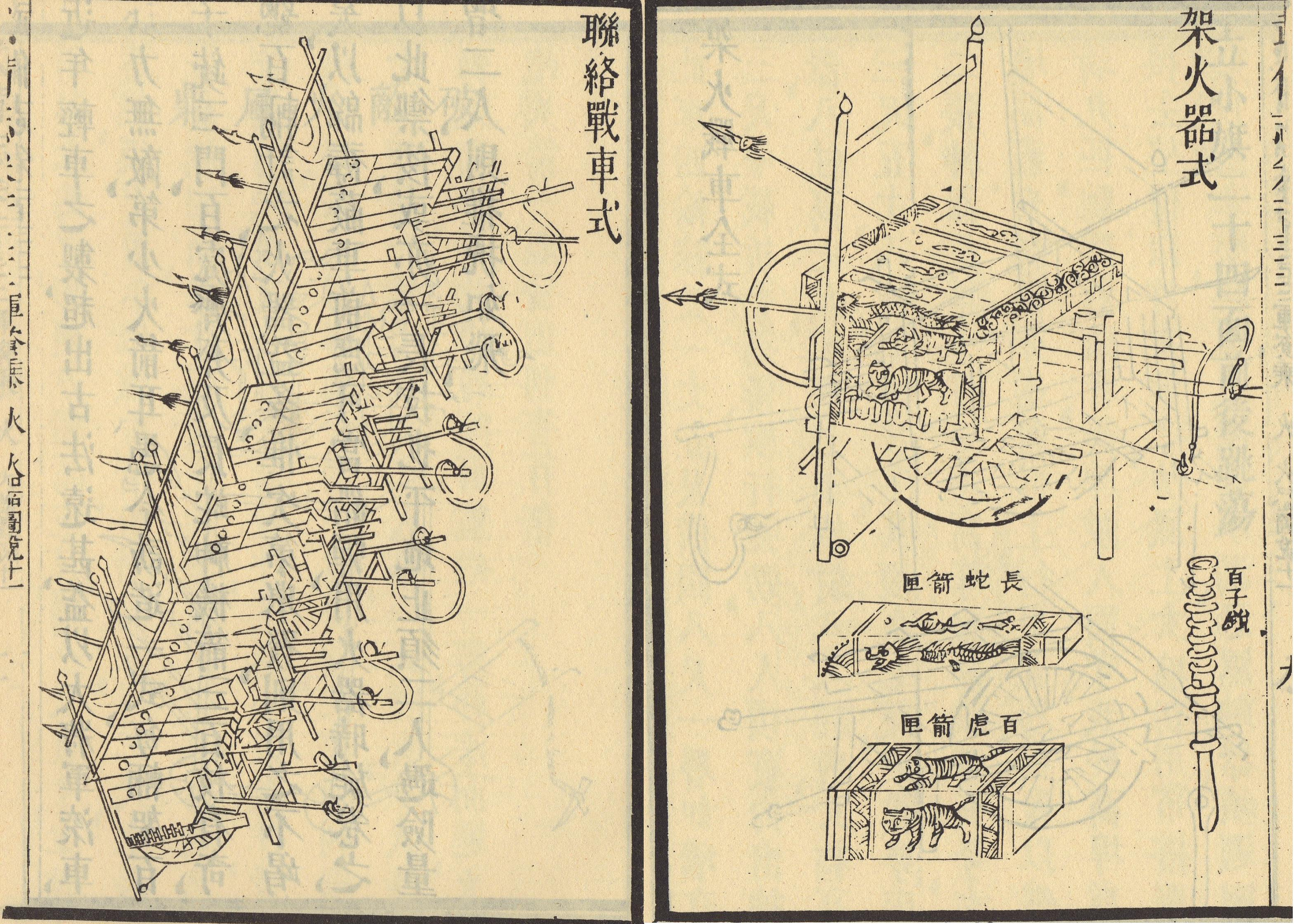 架滿裝備的架火戰車與它的聯絡戰車式